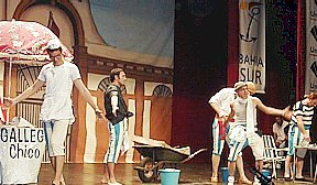 CUARTETO INFANTIL EL PALO 'LOS REYES VAGOS' CARNAVAL MALAGA 2002 TEATRO CERVANTES